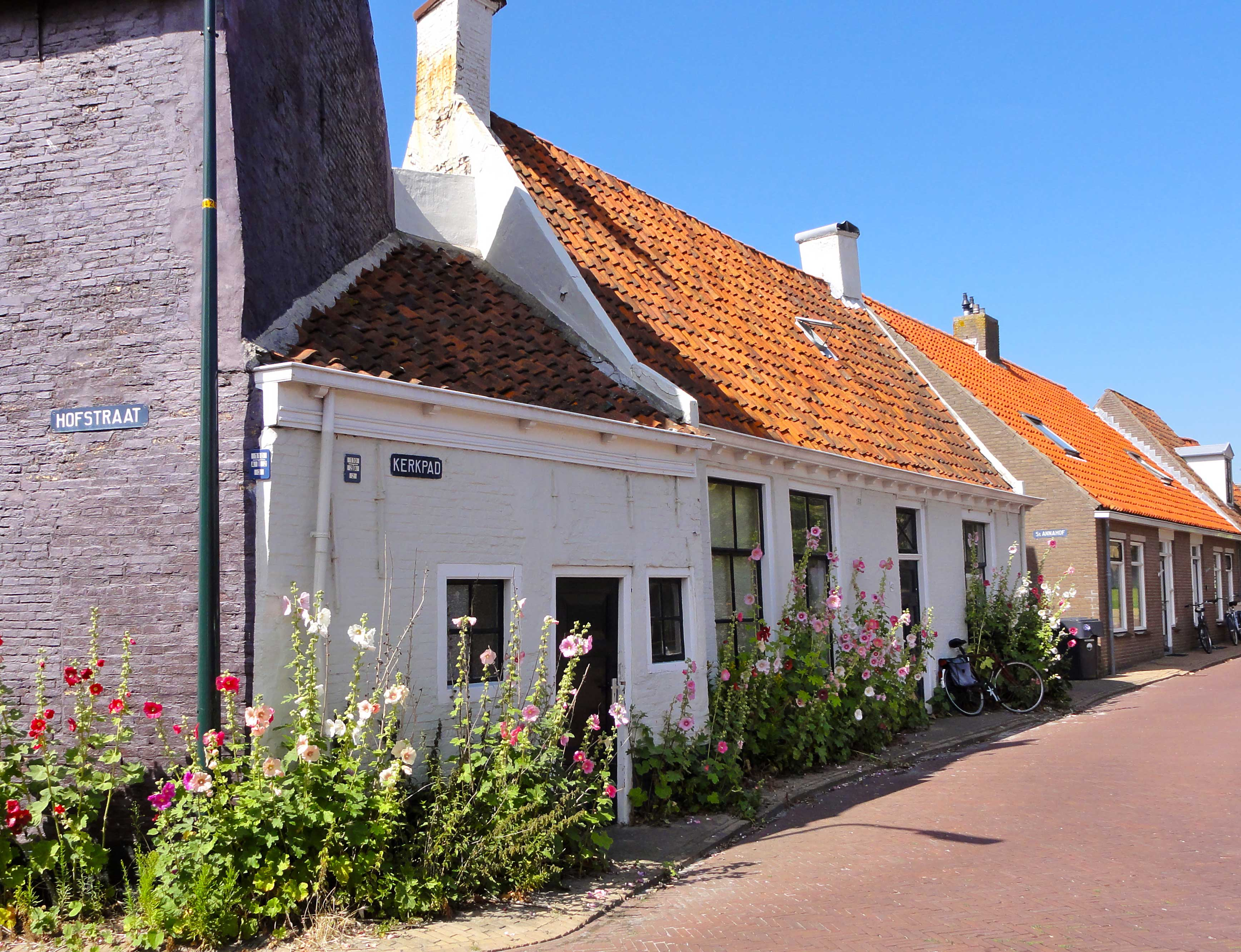 Kerkpad 40 in Harlingen